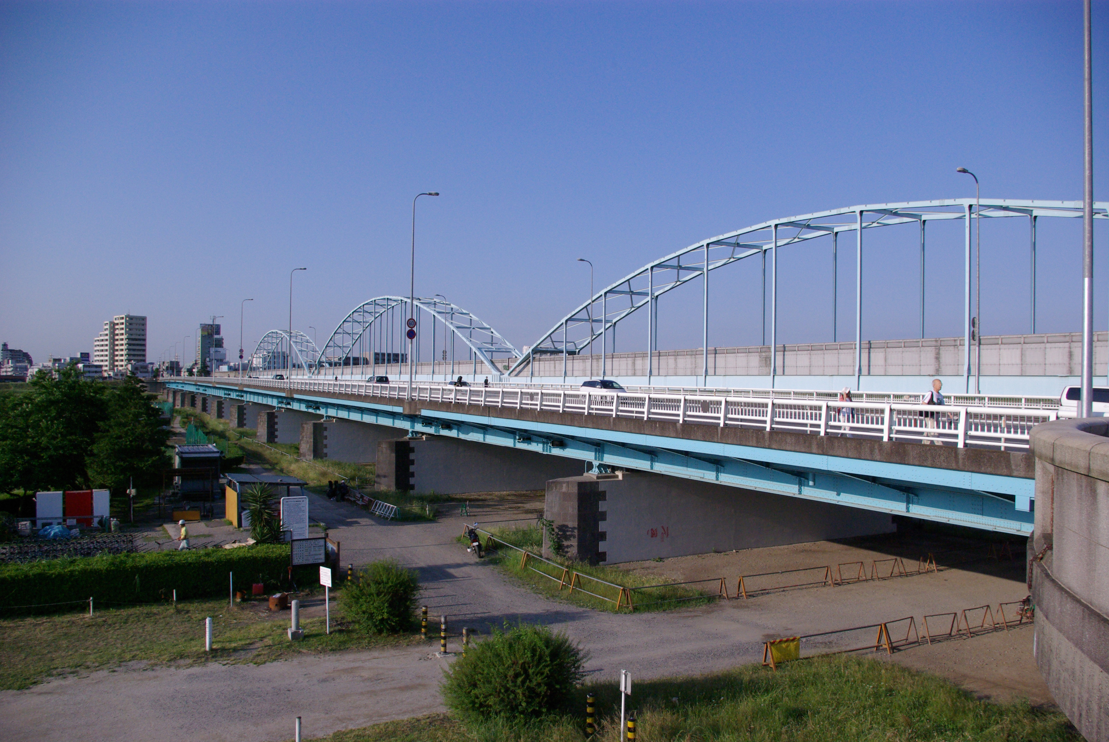 Tamagawa Ohashi Bridge (Tokyo - Kanagawa, Japan)